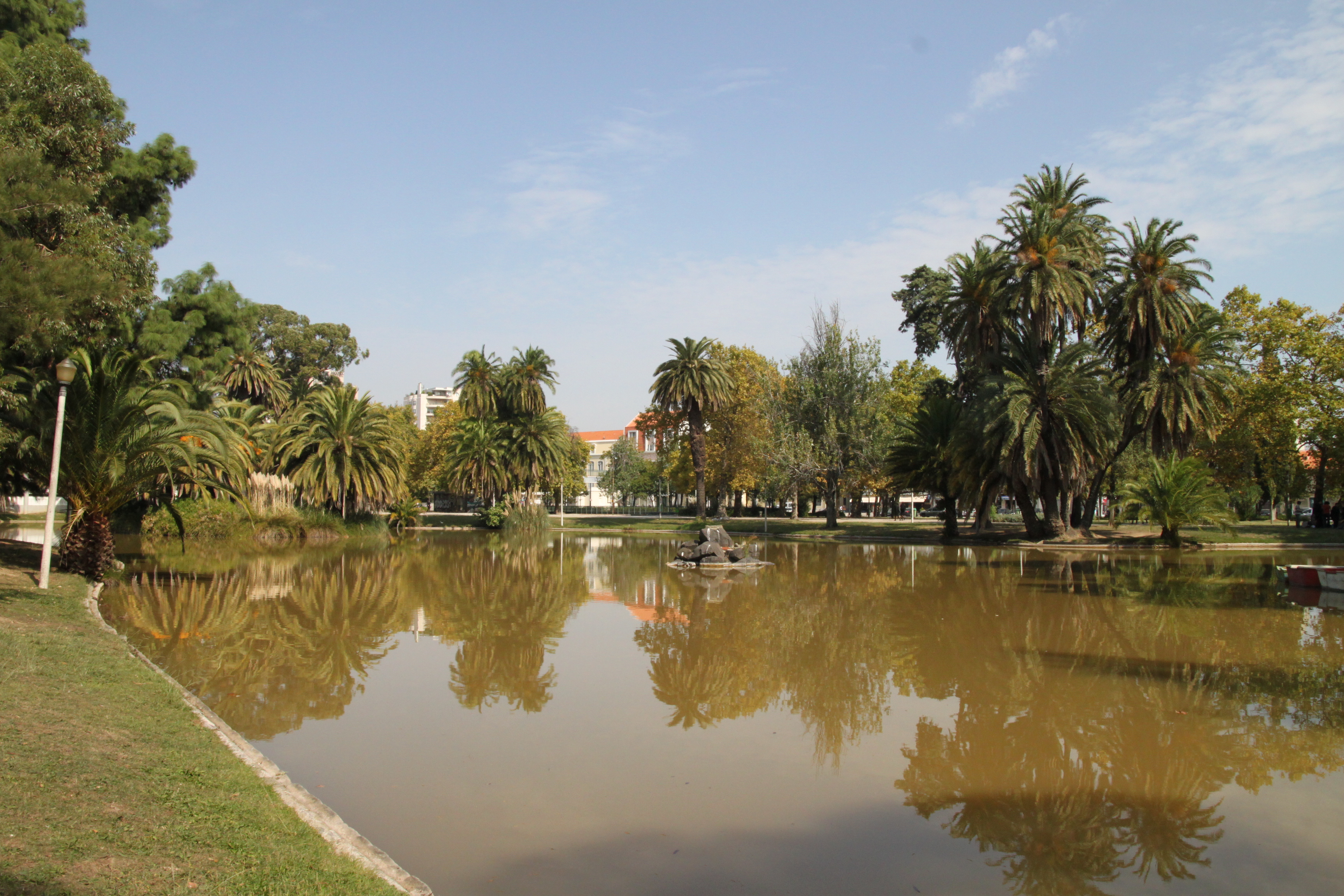 Jardim do Campo Grande This file was uploaded for Wiki Loves Monuments in Portugal with the unique identifier 97023904.